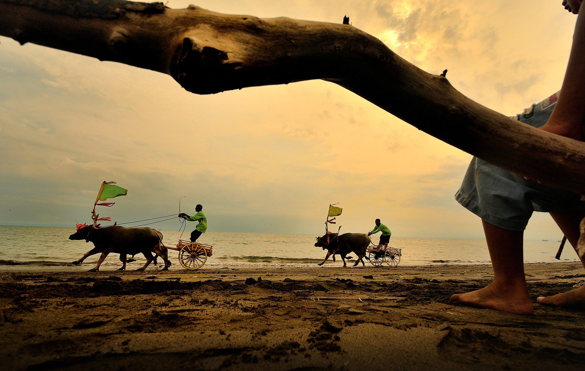 Mekepung merupakan tradisi warisan khususnya bagi petani yang ada di Jembrana Bali dimana Mekepung merupakan perayaan rasa syukur atas hasil panen yang melimpah.